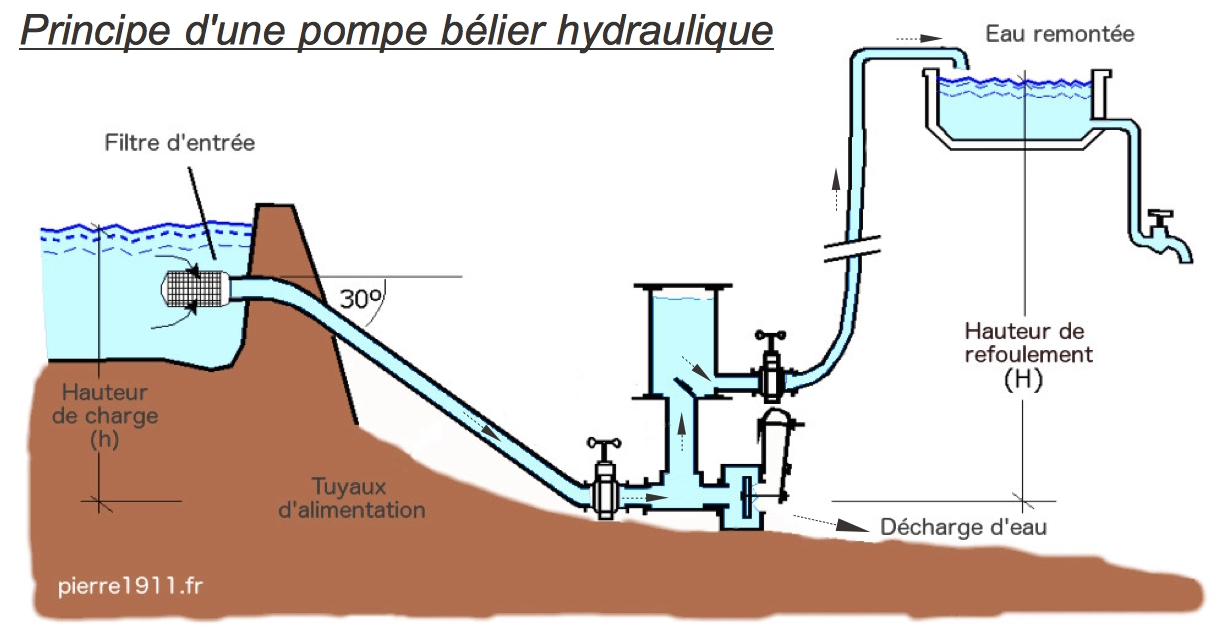 Schéma de principe d'une pompe bélier